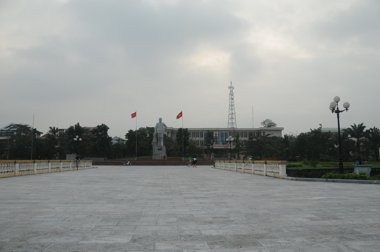 Tượng đài cựu bí thư Lê Duẫn